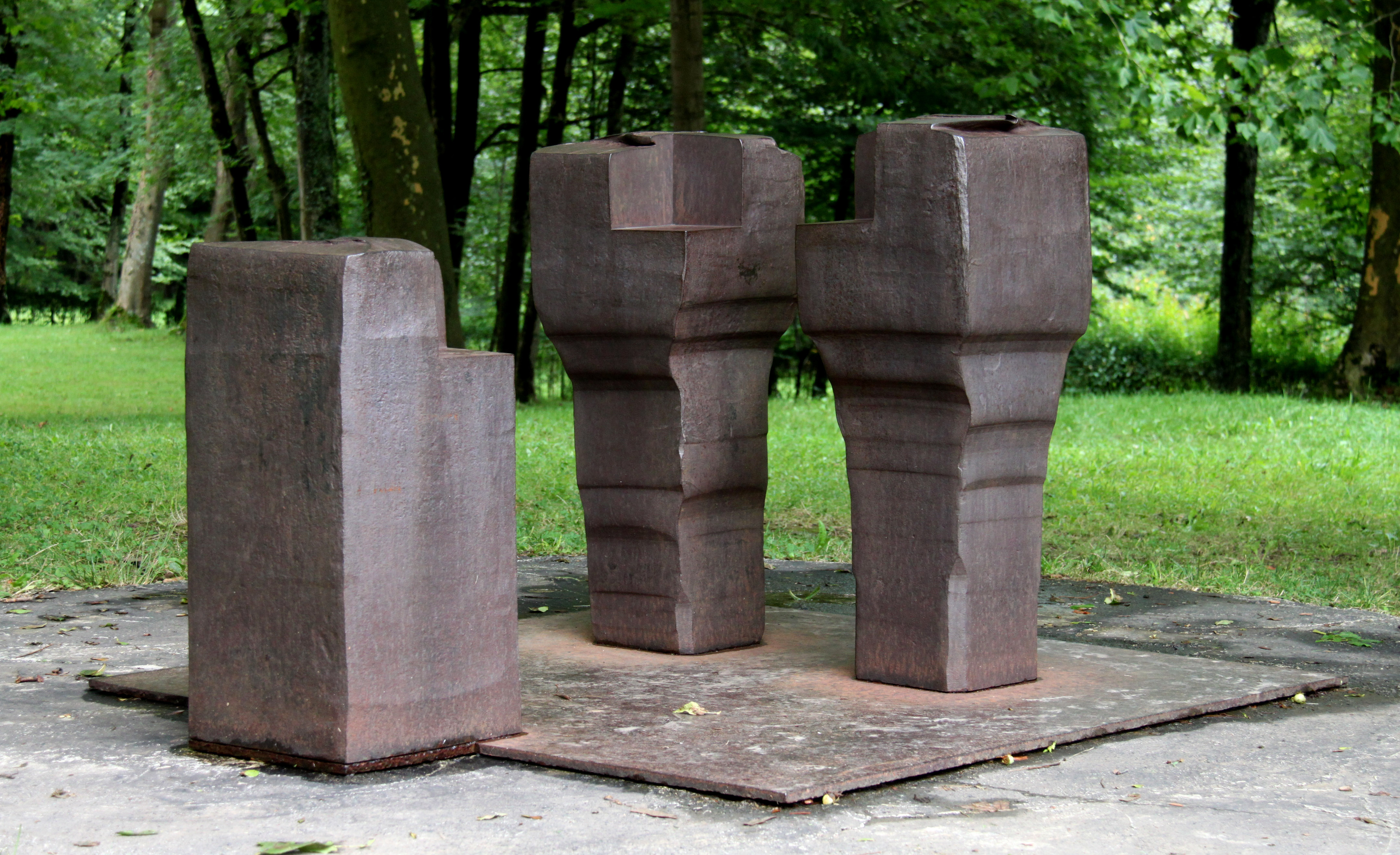 Foto realizada el 12 de Agosto de 2010 en el Museo Chillida Leku de Hernani.